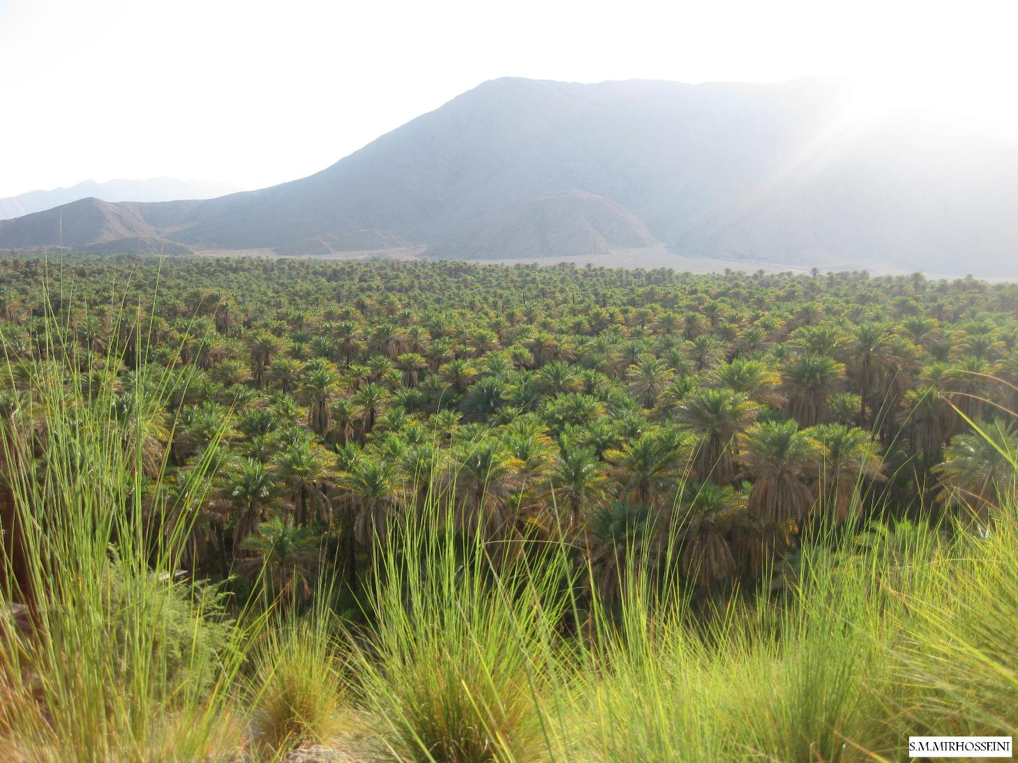 نخلستان